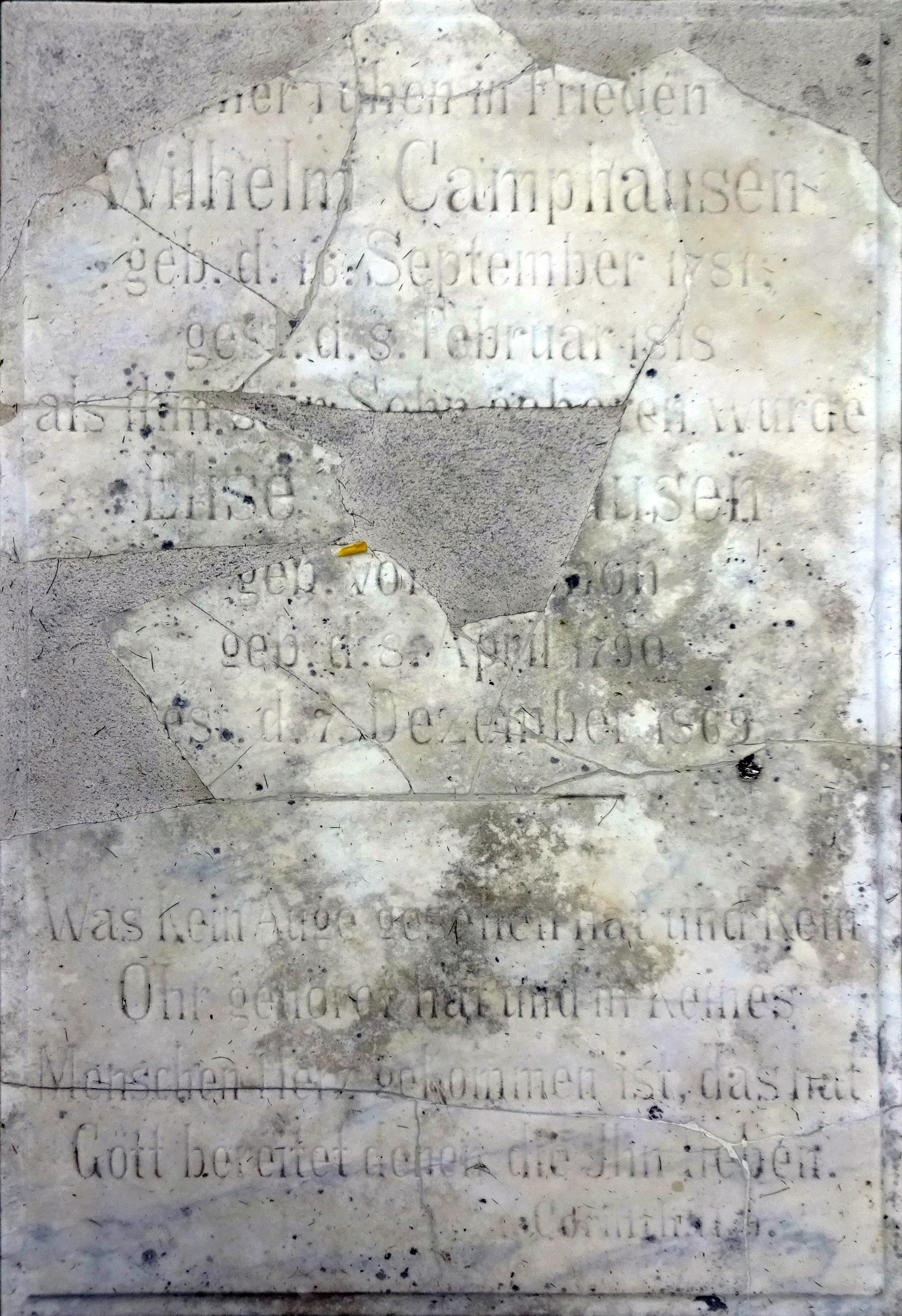 Grabstein Wilhelm Camphausen (* 16. September 1781; † 8. Februar 1818) als ihm sein Sohn geboren wurde. Elise Camphausen (* 8. April 1790; † 7. Dezember 1869), Golzheimer Friedhof, nördlicher Teil